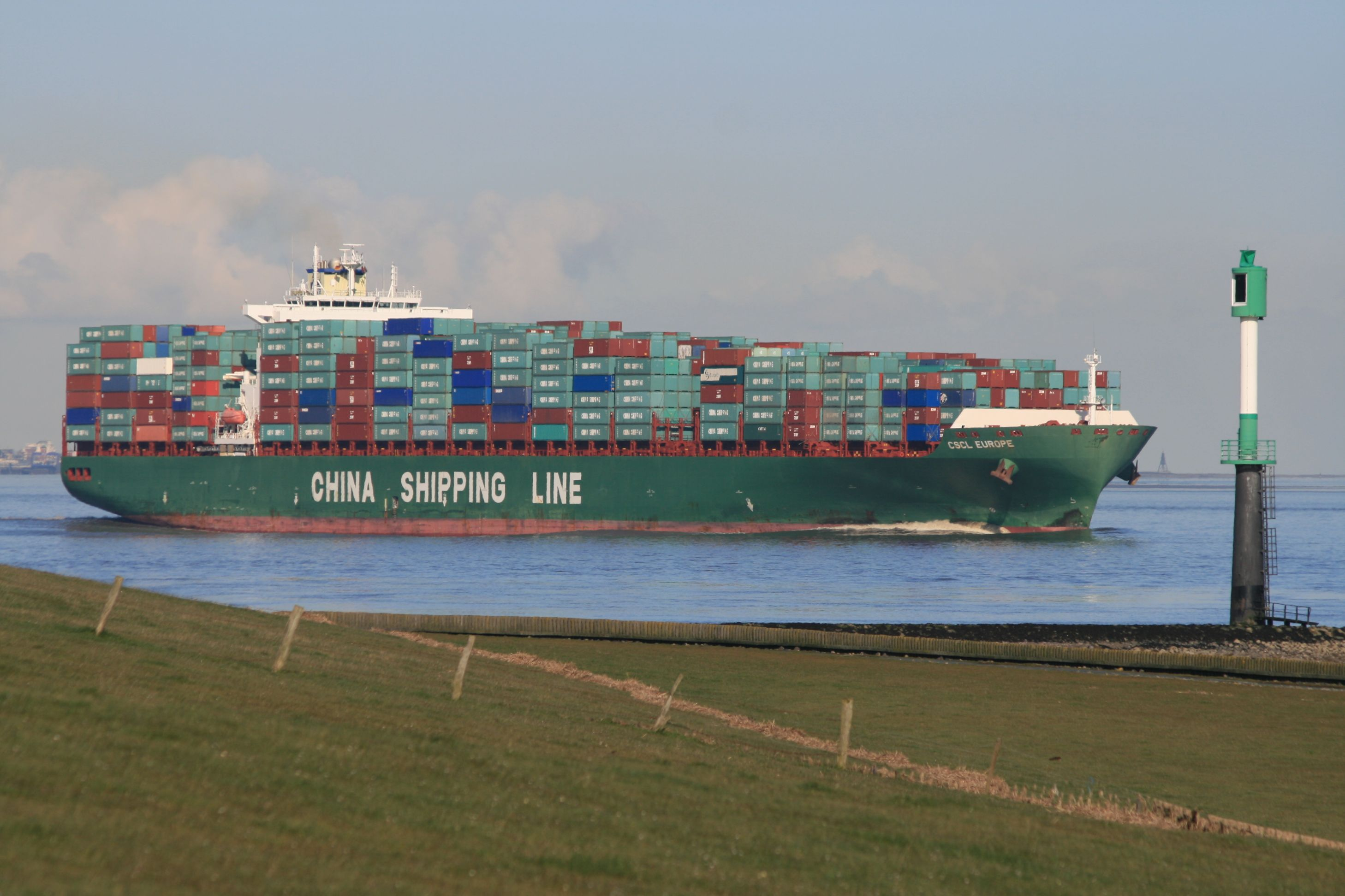 CSCL Europe (8.468 TEU, 11,50 m Salzwassertiefgang) am 9. April 2008 bei Glameyer Stack IMO Number: 9285988 MMSI Number: 212175000 Callsign: P3VZ9 Length: 334 m Beam: 43 m